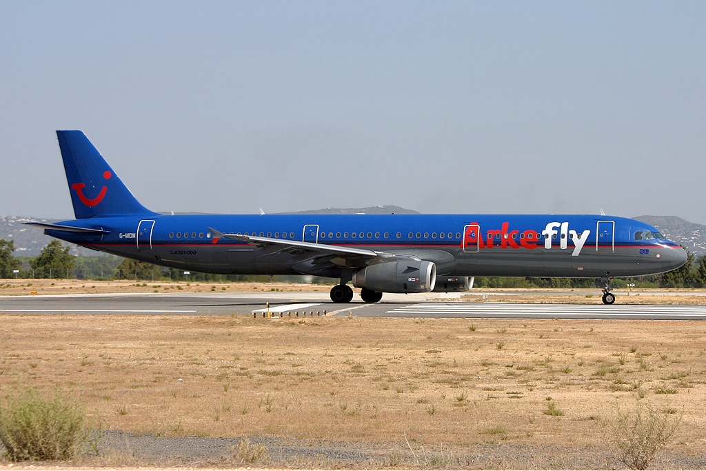 Arkefly Airbus A321